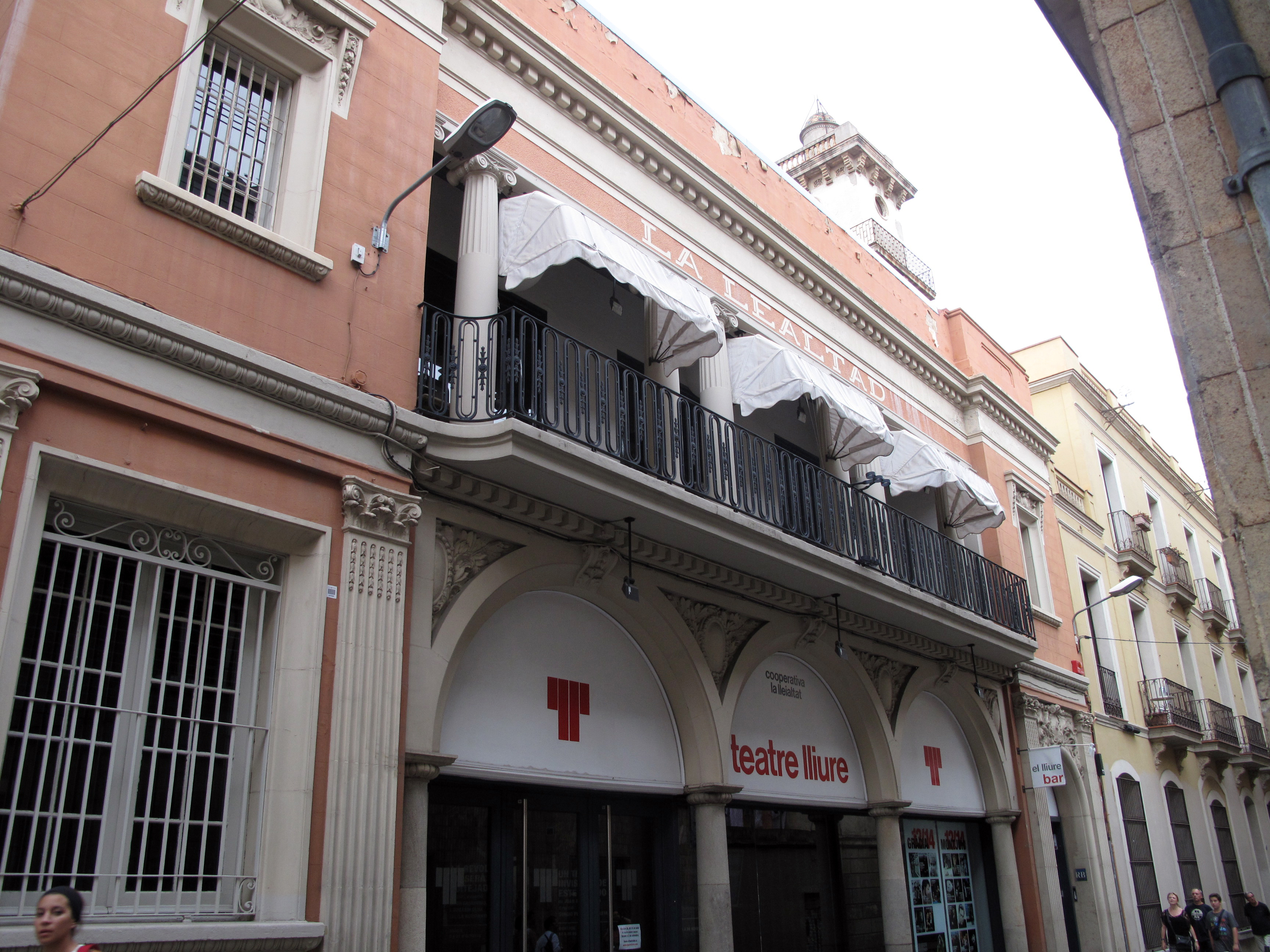 Cooperativa Lleialtat (Barcelona)